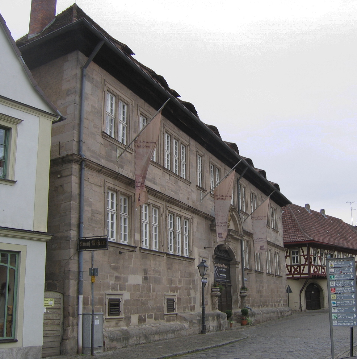 Iphofen, Bavaria, Germany, Altes Rentamt